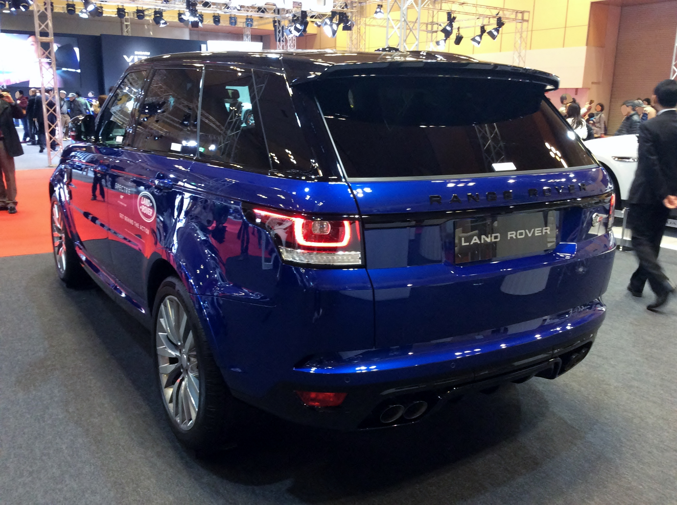 大阪モーターショー2015においてL494系ランドローバー・レンジローバースポーツSVRを撮影。